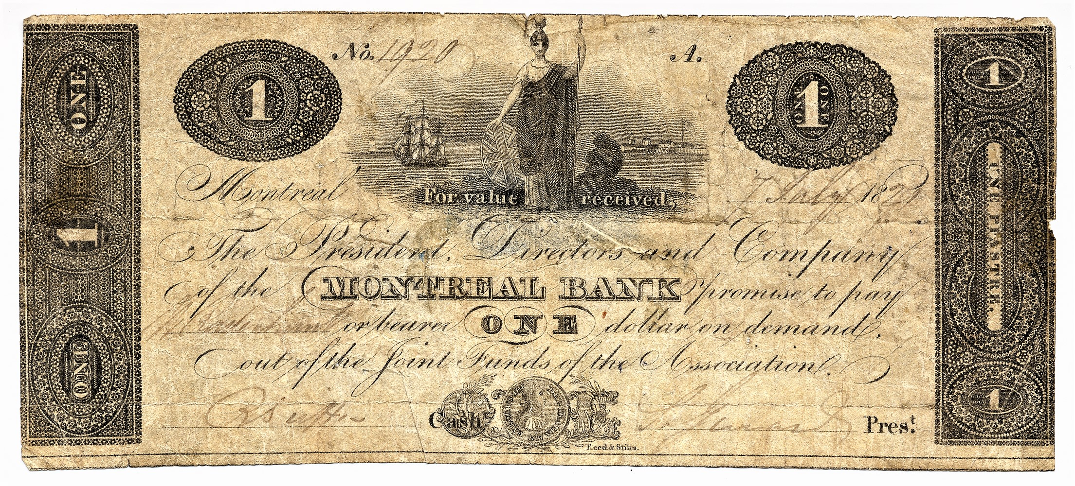 Billet de 1 dollar de la Bank of Montreal, 1821. Créée en 1817, la Bank of Montréal devient une banque à charte en 1822 sous le nom de la Banque de Montréal. Ce billet de 1 dollar est imprimé par l’imprimeur américain Reed Stiles and Company. On y voit la figure allégorique de Britannia, personnification féminine de la Grande-Bretagne, entourée d’un navire qui symbolise le commerce et d’une ville qui pourrait être Montréal.